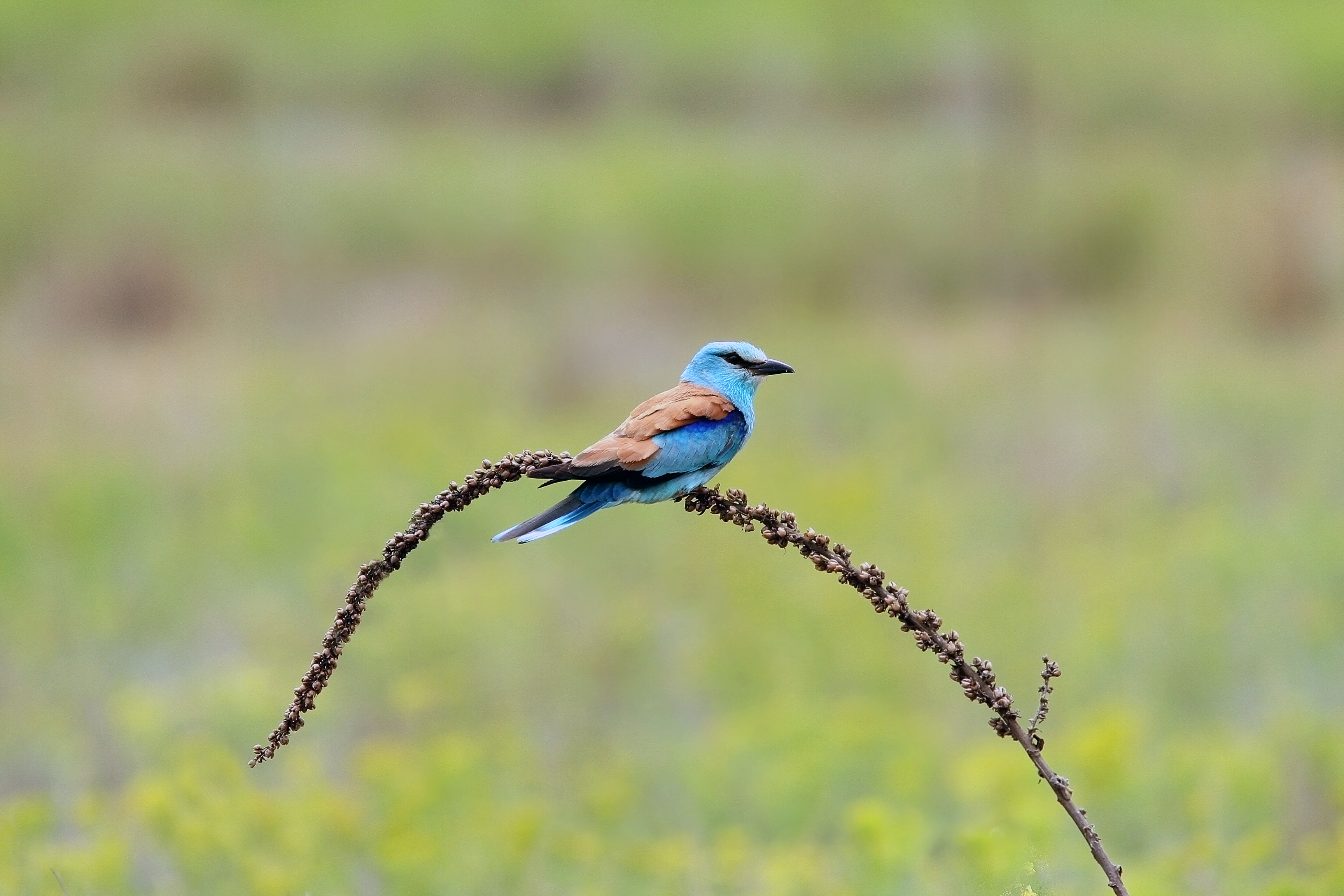 Coracias garrulus, European Roller in Romania 2007